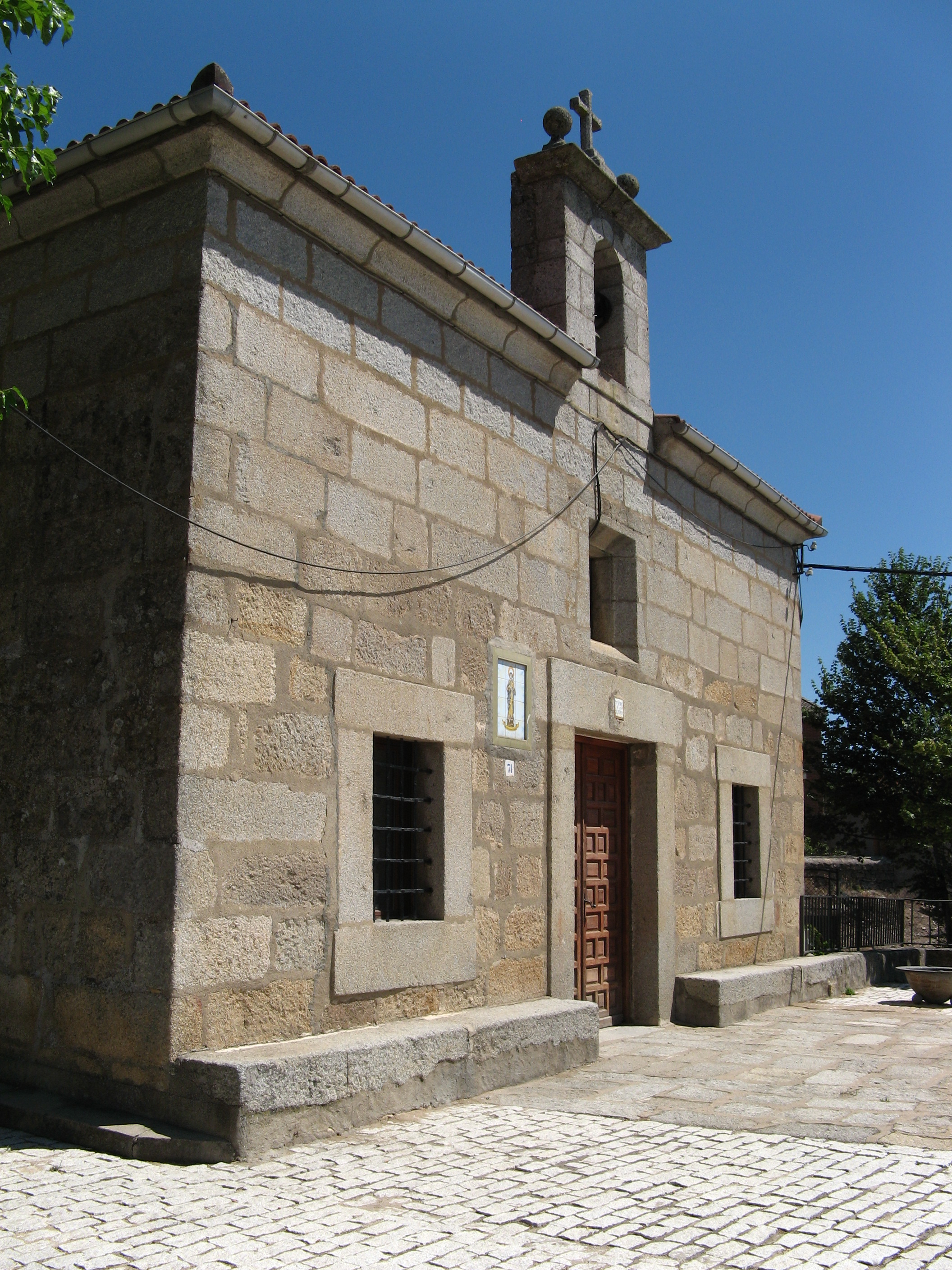 Ermita de Nuestra Señora de los Remedios. Sotillo de la Adrada. Provincia de Ávila. Castilla y León. España